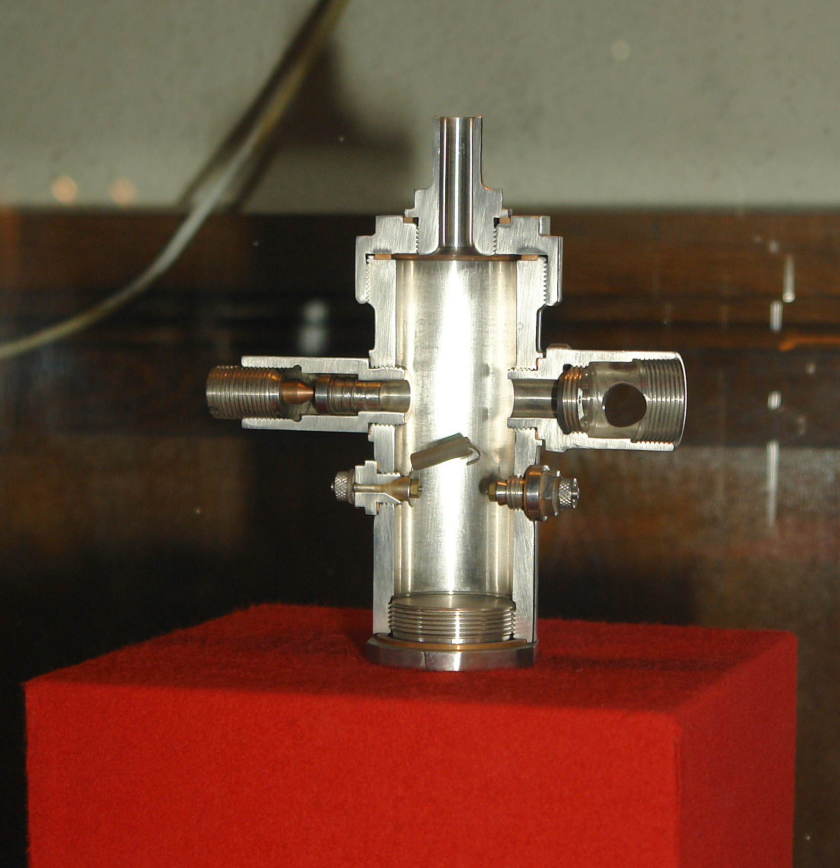 Экспериментальный жидкостный ракетный двигатель ОРМ. Музей космонавтики и ракетной техники; Санкт-Петербург. This photograph was taken in Museum of Space and Missile Technology (Saint Petersburg) Object location59° 57′ 07″ N, 30° 19′ 16″ E